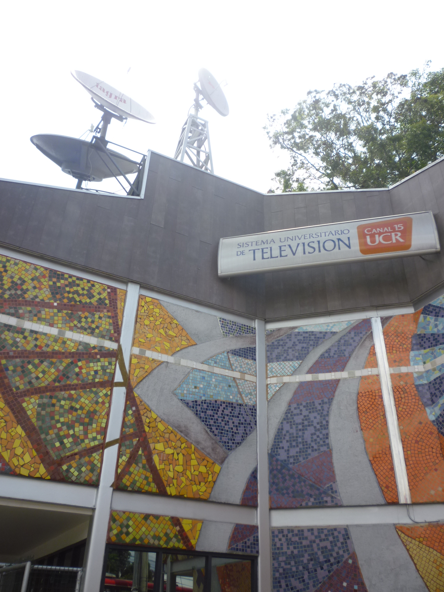 Entrada Canal 15. San Pedro, Costa Rica